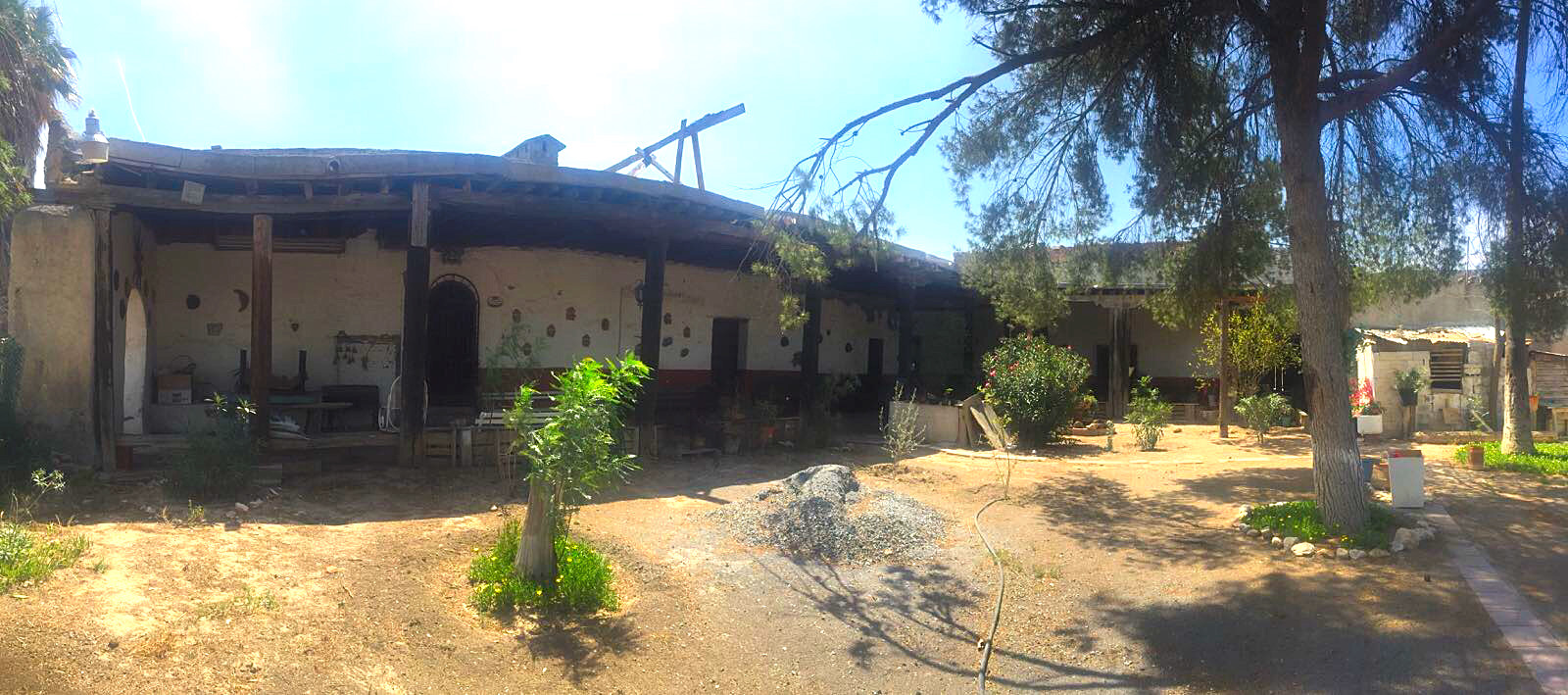 Interior de la Casa grande, construcción que pertenece a la Hacienda de Santa María del Rosario.